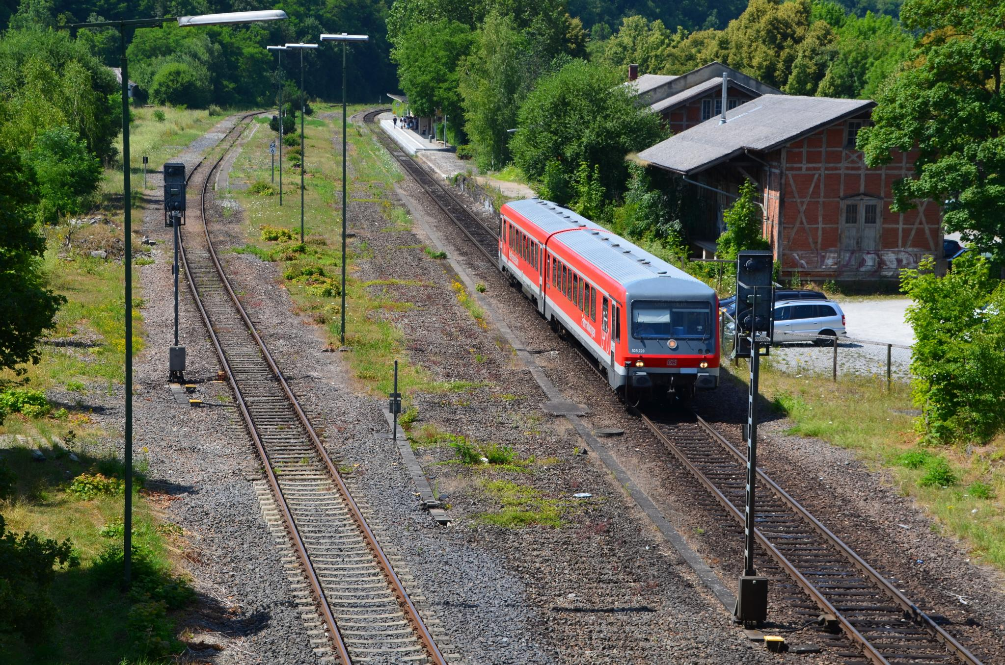 DB-Baureihe 628/928 im Bahnhof Schwäbisch Hall